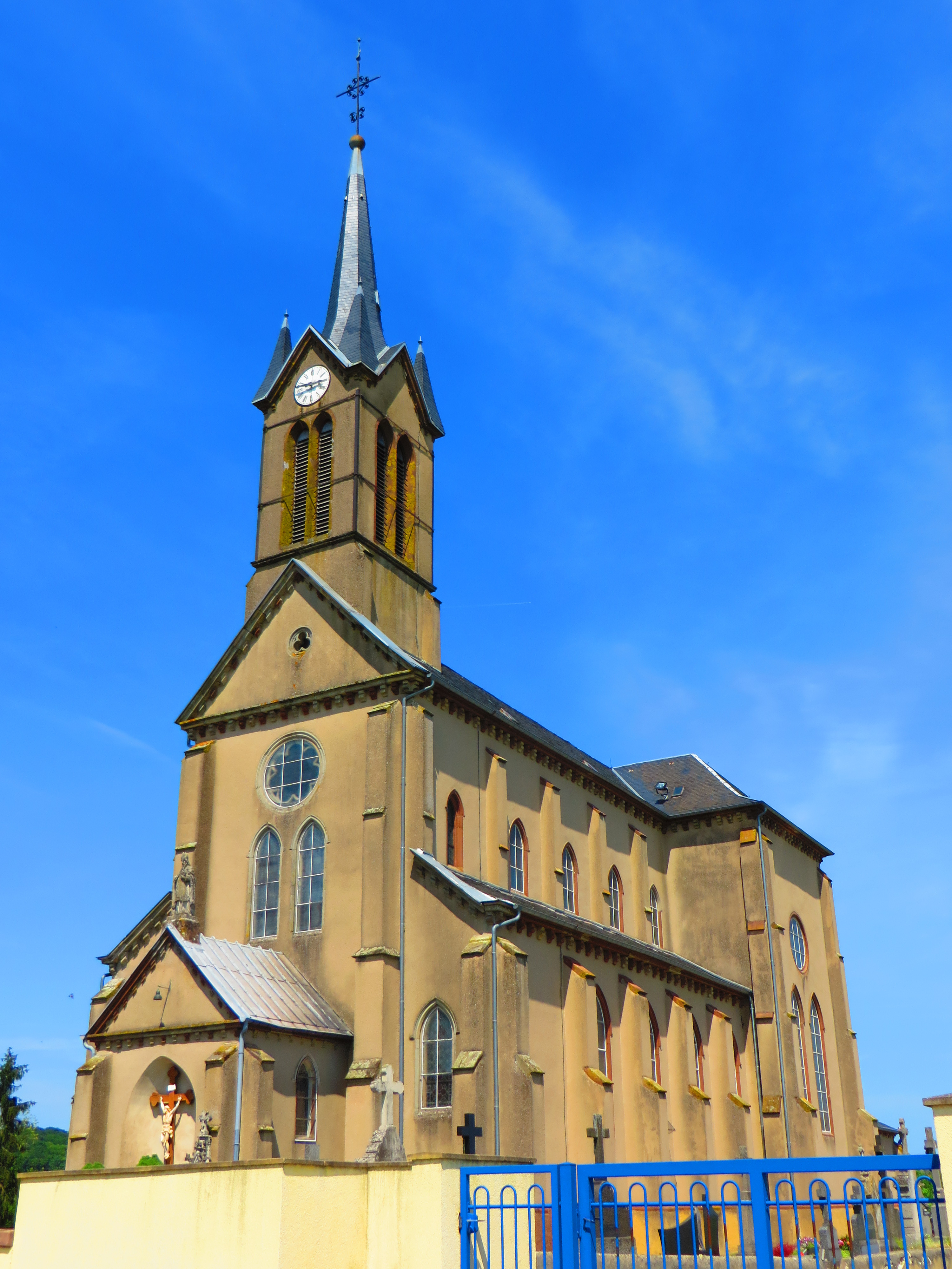 Falstroff eglise